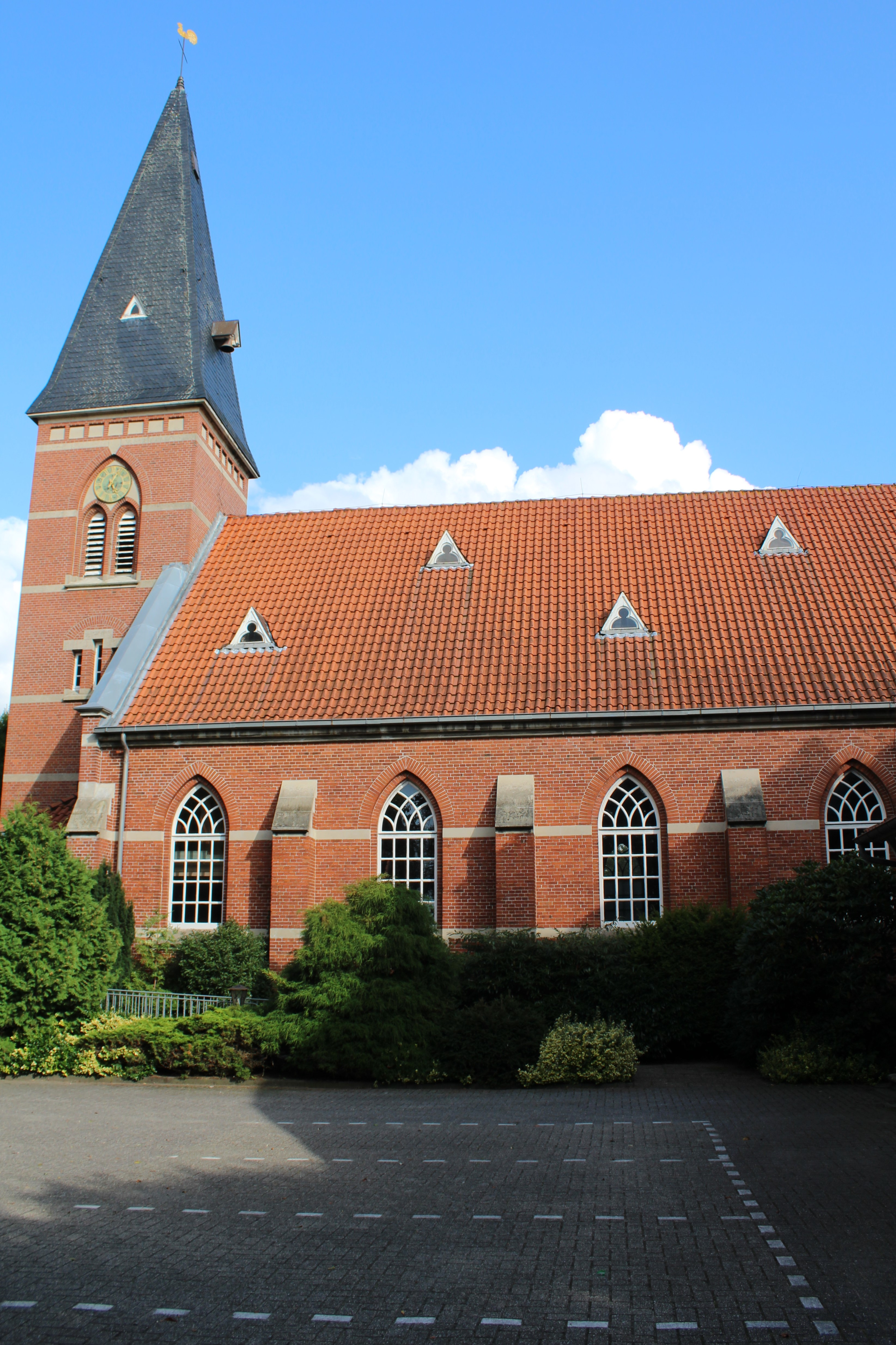 Ev.-reformierte Kirche Möhlenwarf, Landkreis Leer, Ostfriesland, Deutschland